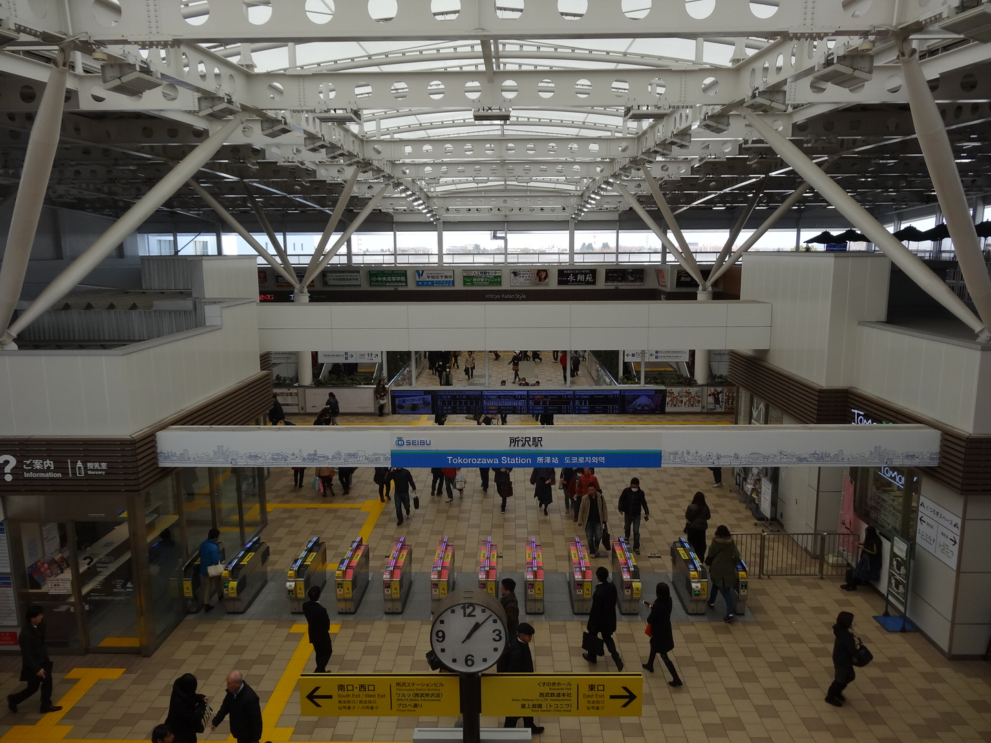 トコニワから見た所沢駅改札口（2014/02/02撮影）